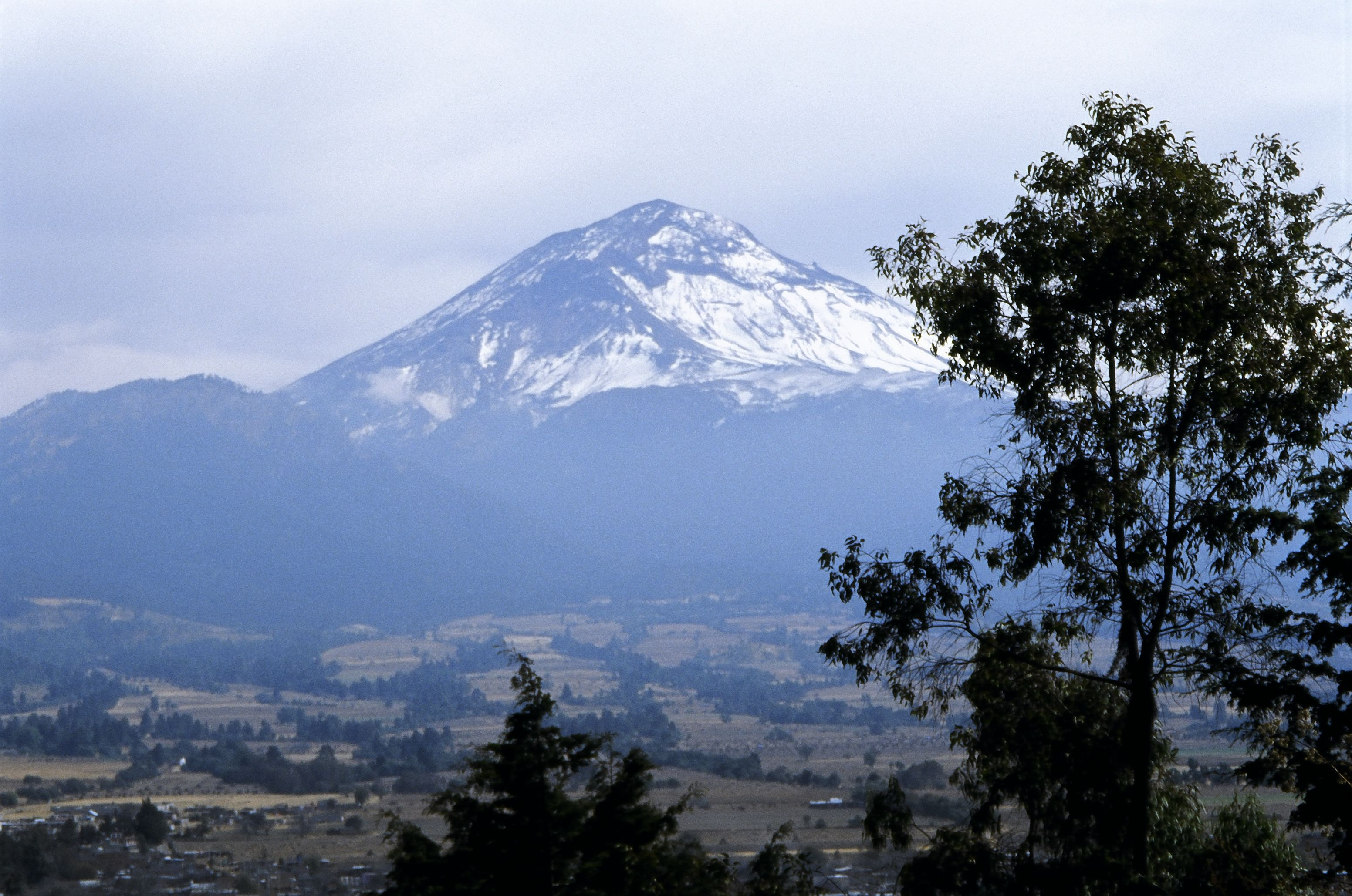 Volcán Popocatépetl, visto desde el Sacromonte, en la ciudad de Amecameca, México. "Trabajo propio" 2004-02-08 Altevir Vechia (Al Vec)